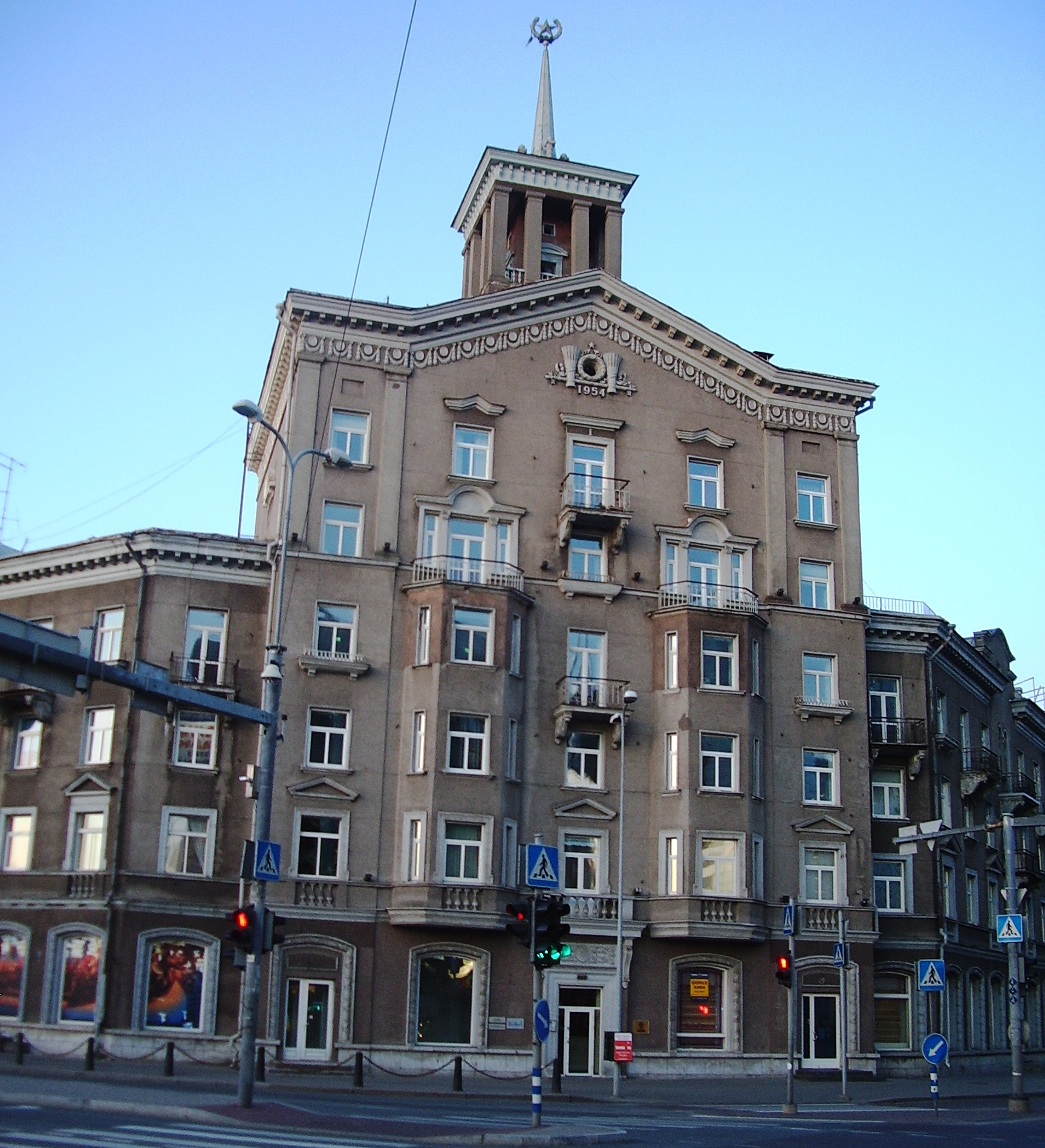 Tartu mnt - Liivalaia